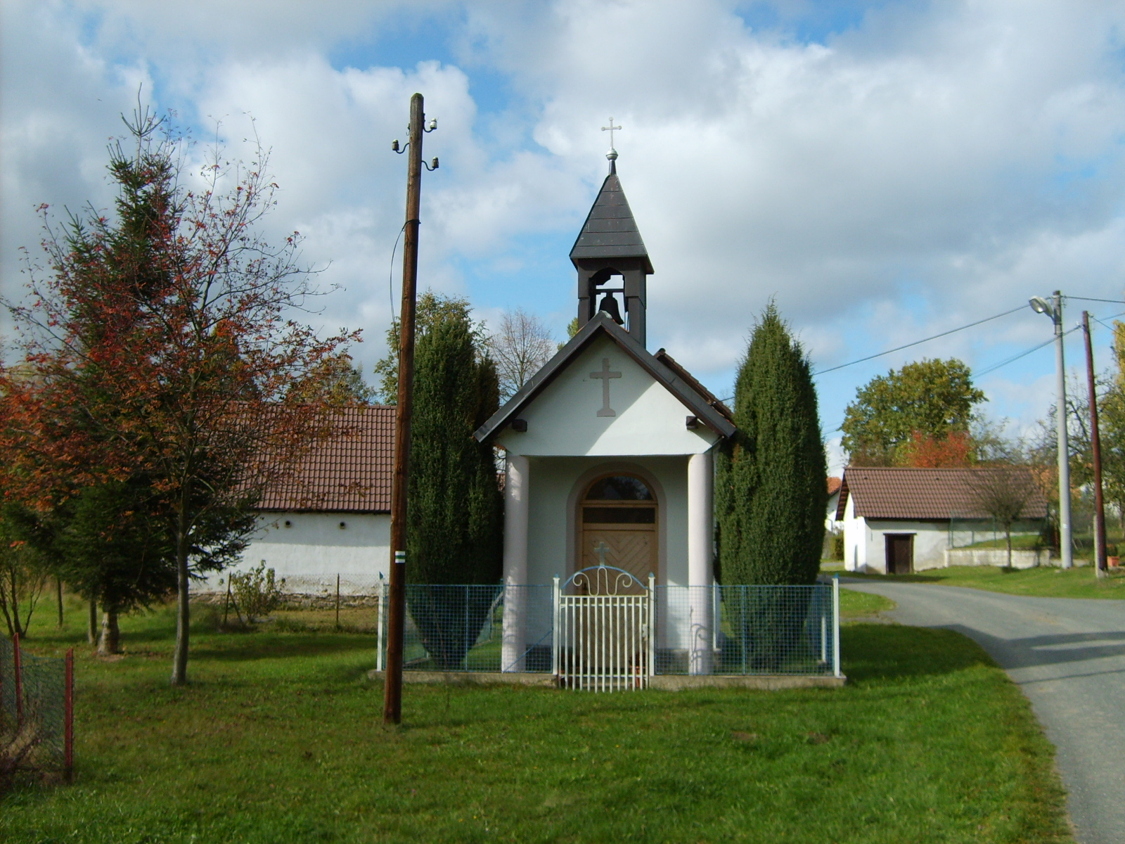 Chapelle in Děkanovice. Czech rep.